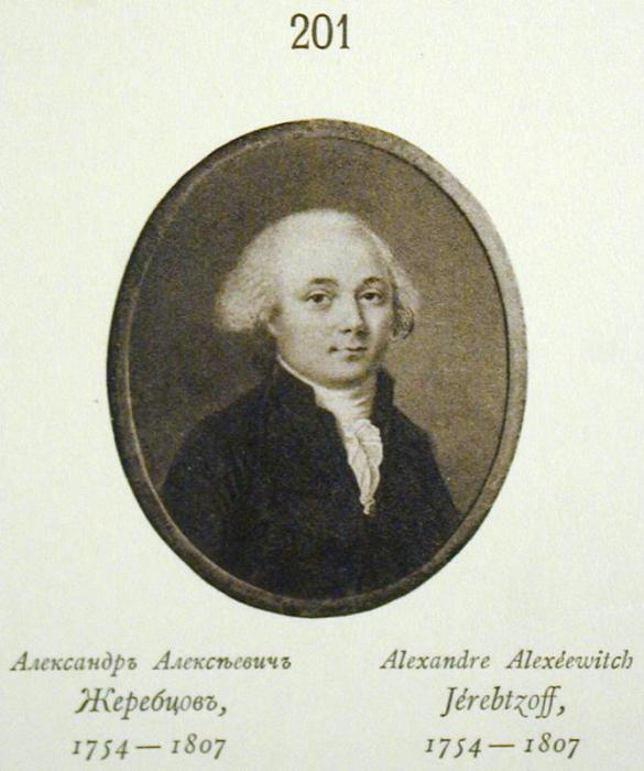 Aleksandr Alekseevich Zherebtsov, 1754-1807